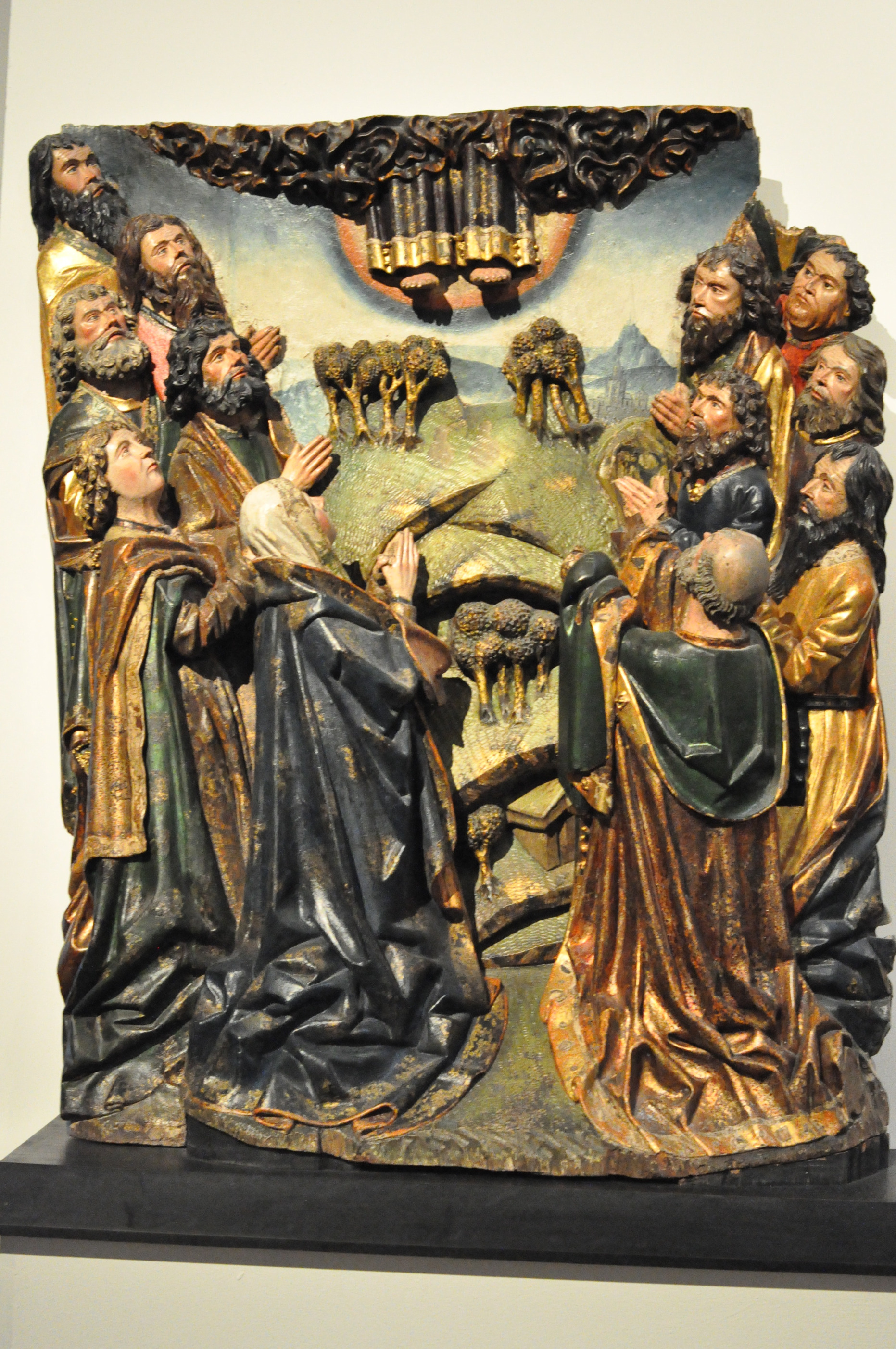 Relieve ó medalla de la Ascensión. Perteneció al desaparecido retablo realizado por Gil de Siloe para la capilla del Colegio de San Gregorio de Valladolid